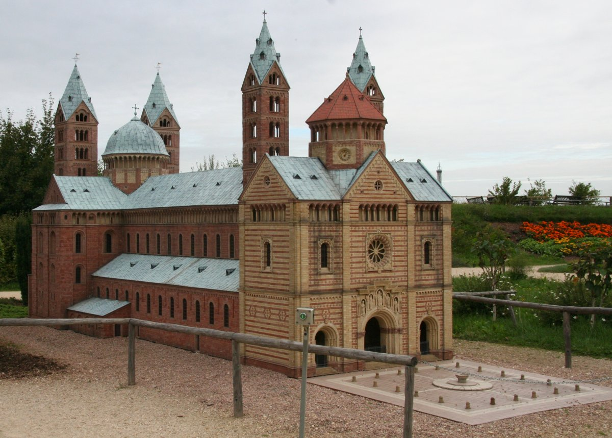 Modell vom Dom zu Speyer in der Miniwelt in Lichtenstein (Sachsen)